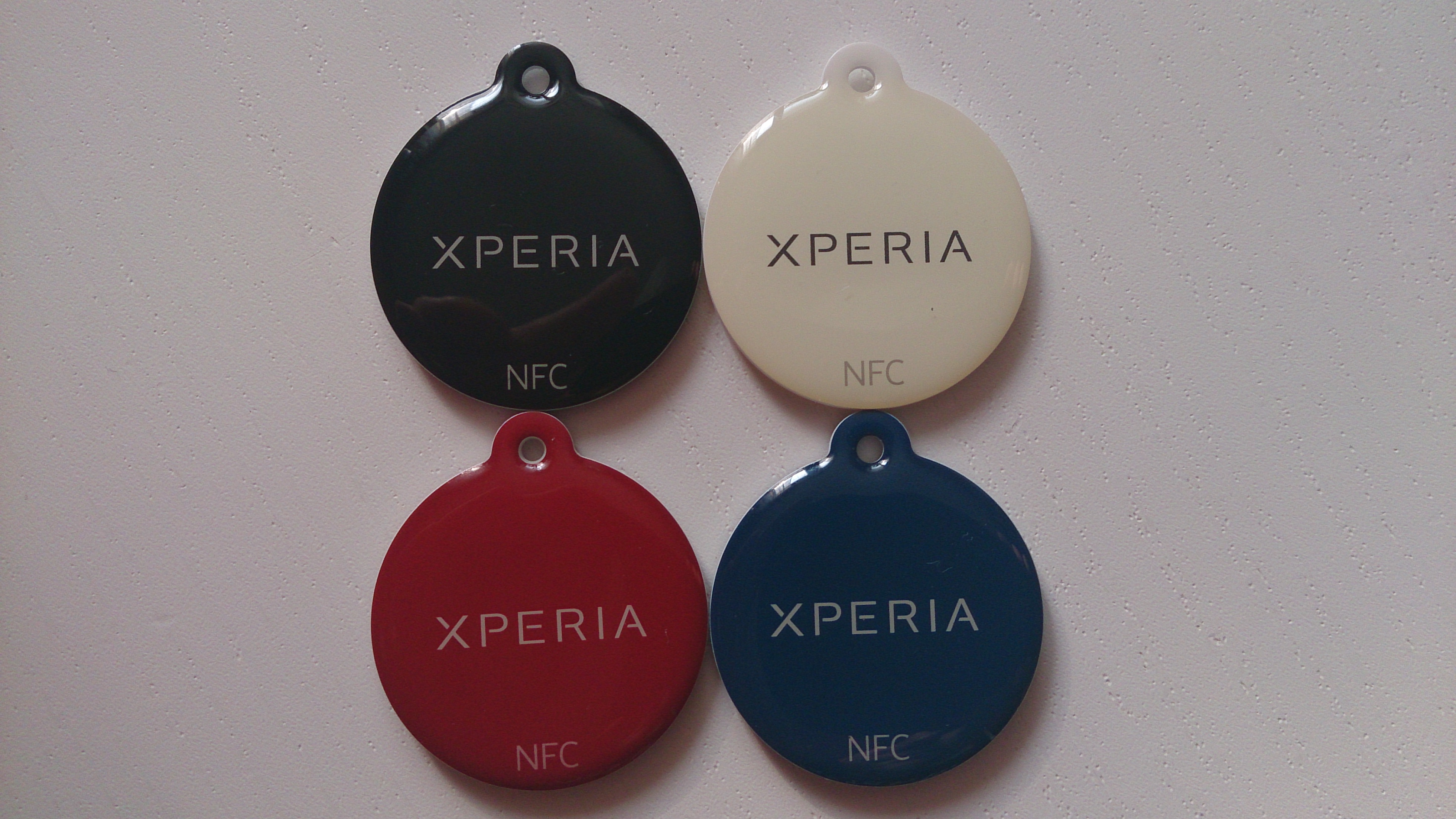 4 štítky